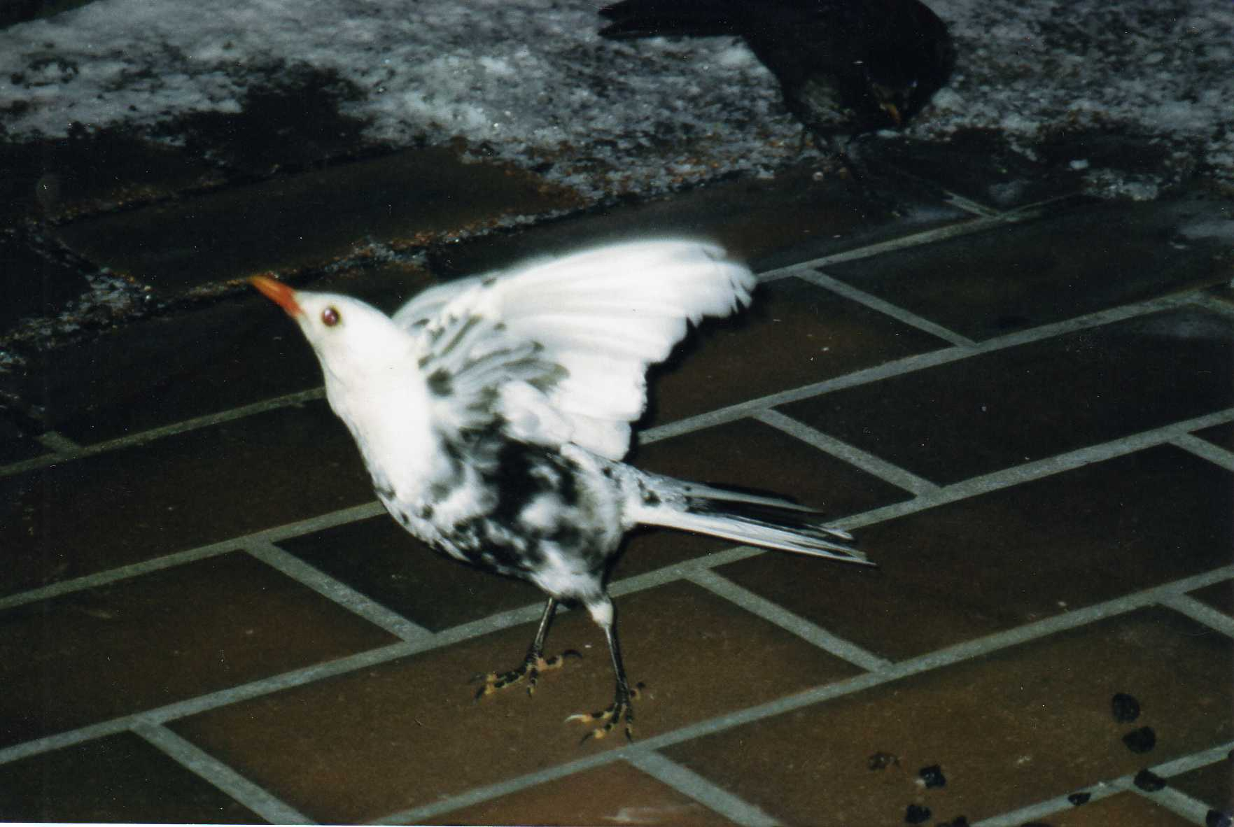 Weisse Amsel